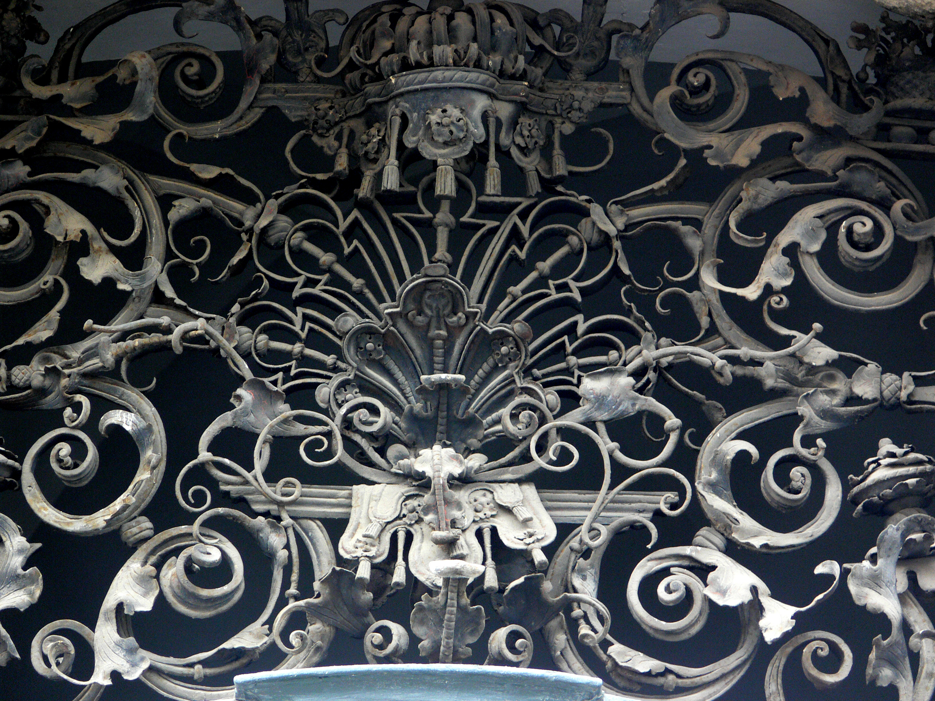 Graz, Palais Saurau, Portal